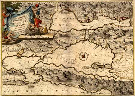 Disegno topografico del canale di Cattaro Venezia, 1688